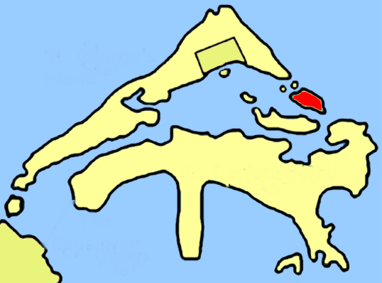 Bermuda-Paget Island.png